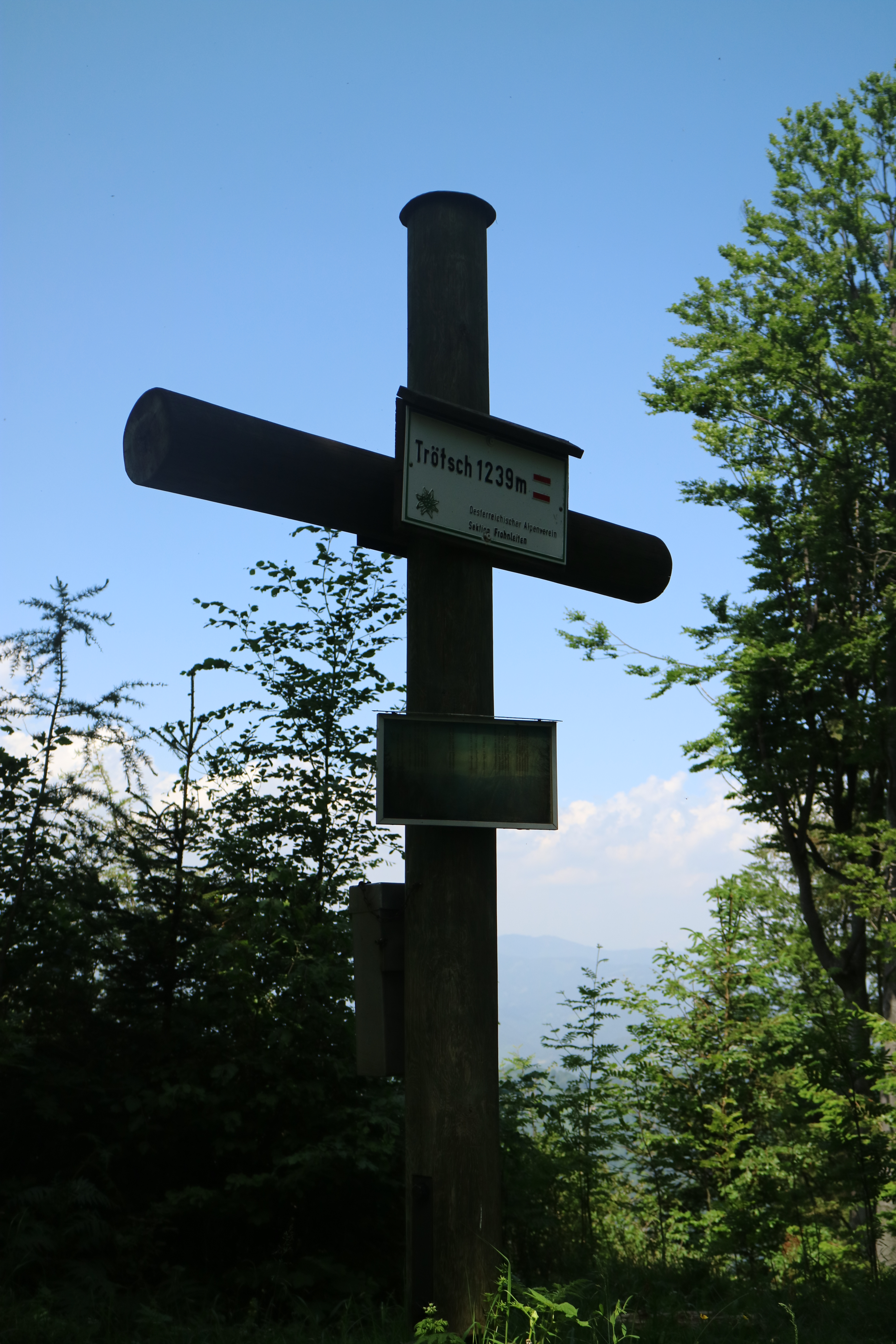 Gipfelkreuz am Hochtrötsch (1239 m), Marktgemeinde Semriach (Steiermark)